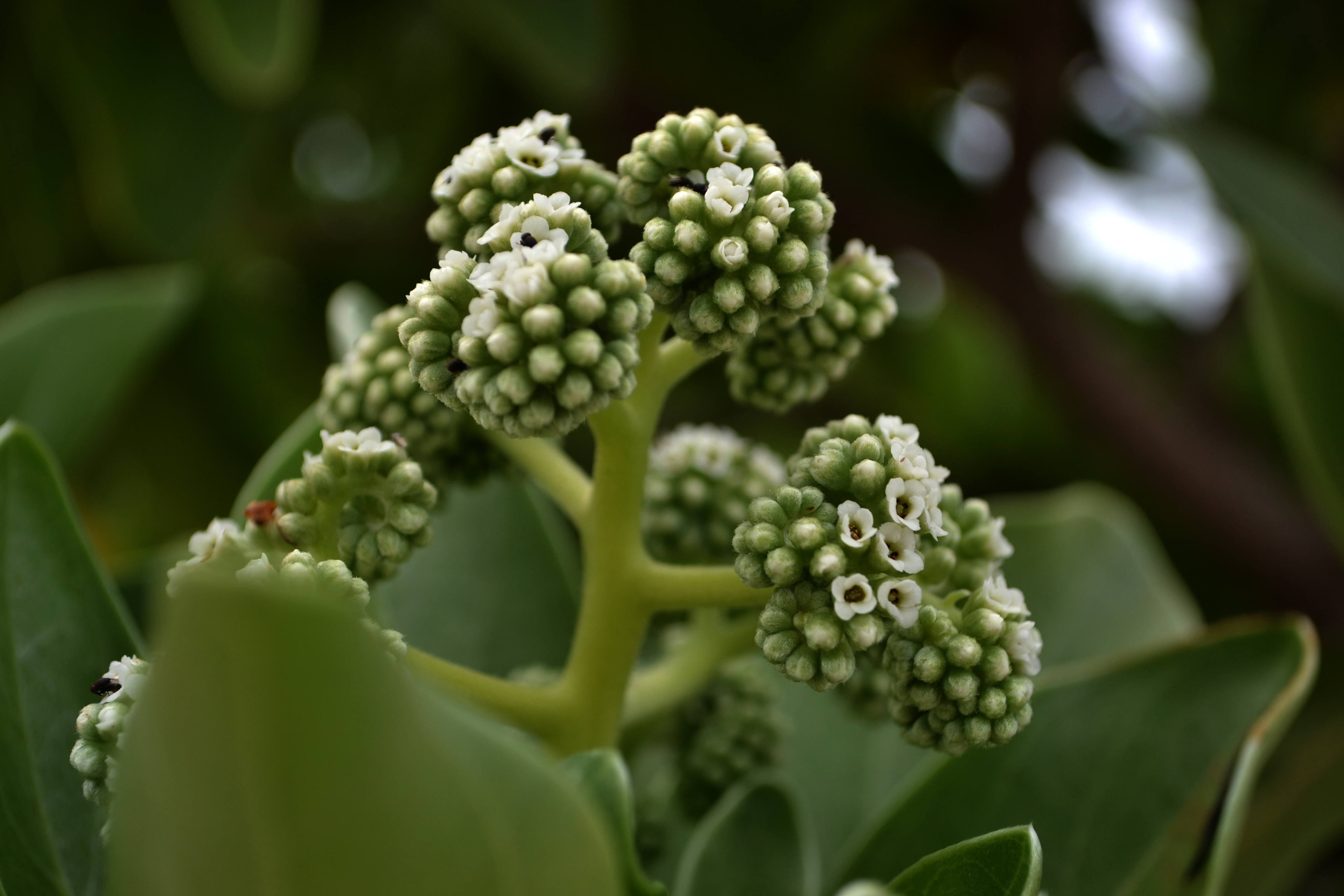 കടല്‍ത്തീരങ്ങളില്‍, ദ്വീപ്‌ സമൂഹങ്ങളില്‍ കാണപ്പടുന്ന ഒരു വൃക്ഷം.